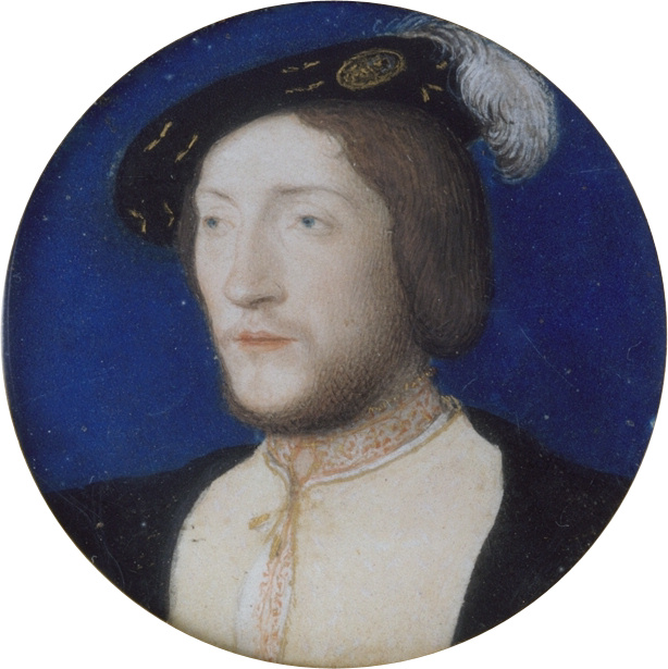 Charles I. de Cossé, comte de Brissac, Marschall von Frankreich